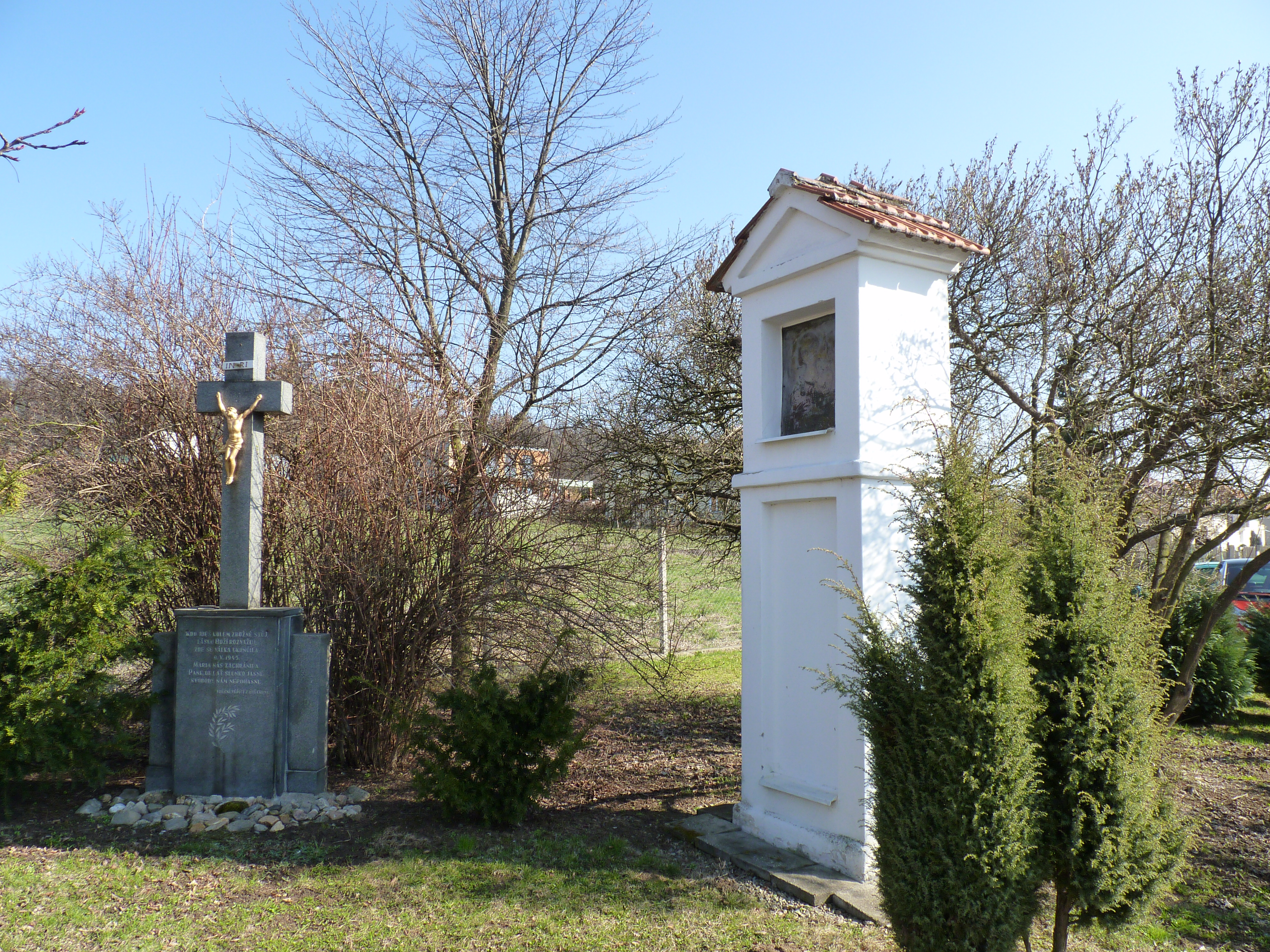 Malá sakrální architektura za autobusovou zastávkou. Brno-Útěchov